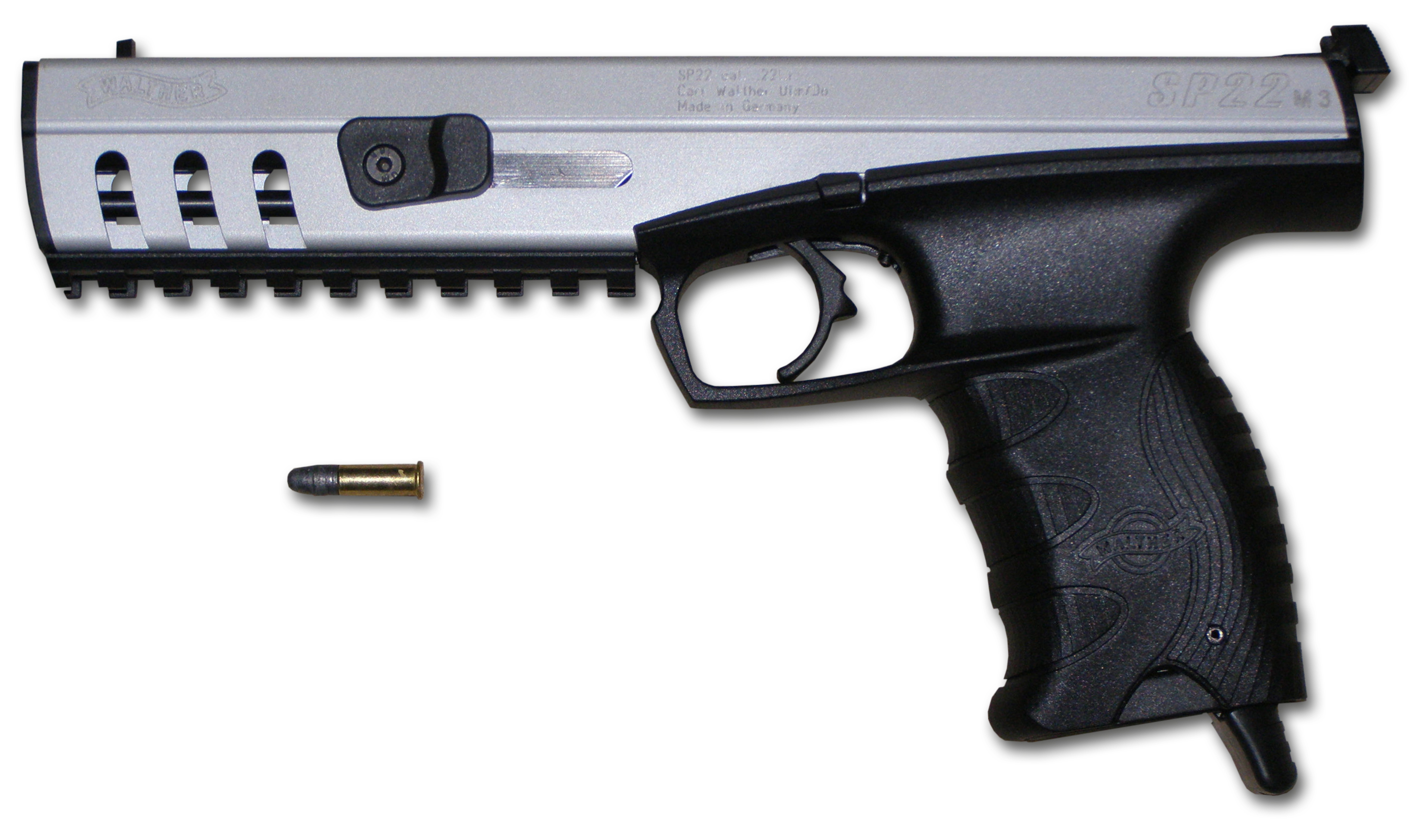 Sportpistole Walther SP22 M3